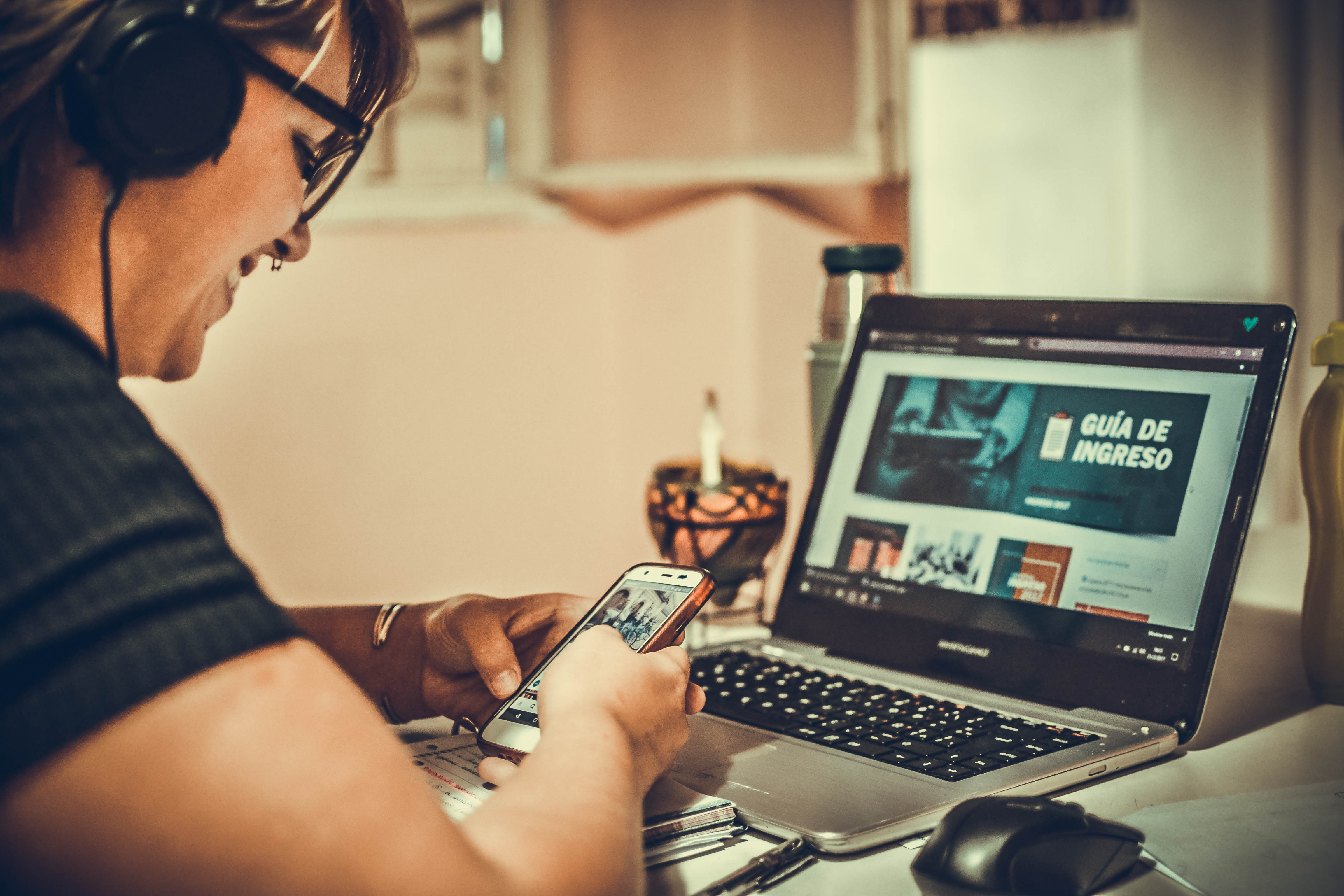 Uso de dispositivos digitales, educación virtual